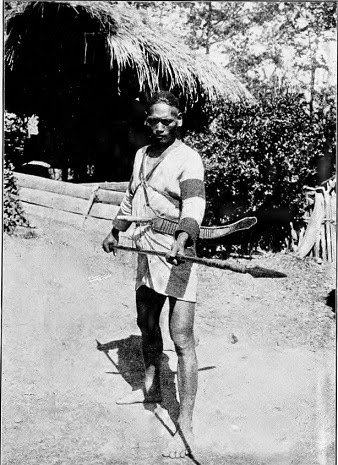 Taiyal (泰雅族) 戰士